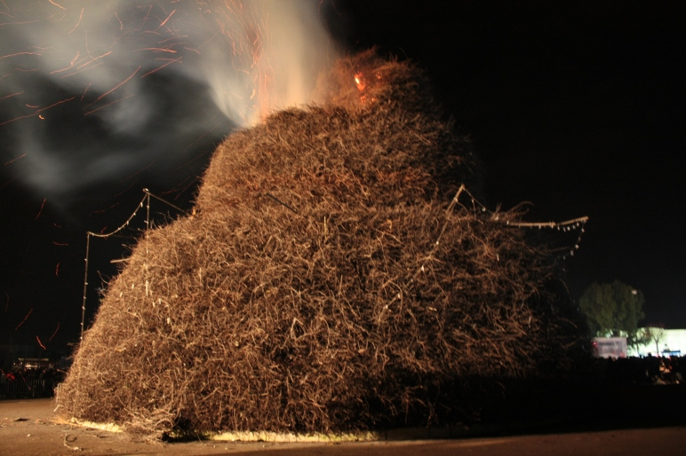 Paride De Carlo (scattata qualche ora dopo, dopo il concerto)